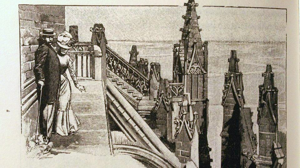 Notre Coeur. Auf der Spitze des Turms von Le Mont-Saint-Michel